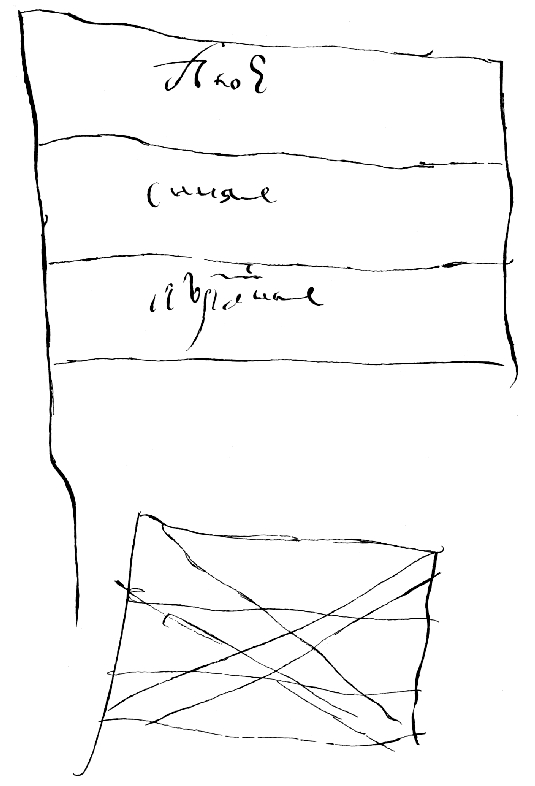 Знамя, рисованное Петром I в черновом рескрипте Украинцову, посланном с Жерловым в 1699 году.